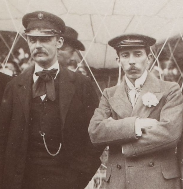 [Collection Jules Beau. Photographie sportive] : T. 7. Année 1898 / Jules Beau : F. 46v. Jardin d'acclimatation, départs de ballons libres ; Flameng, Kriêger, Archdeacon, De Santos Dumont, Boureau, Amy, E. Aimé